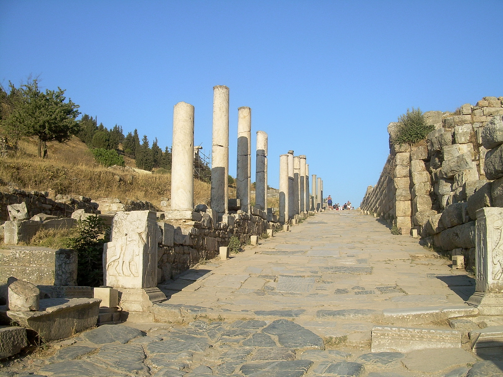 Kuretenstraße, Ephesus